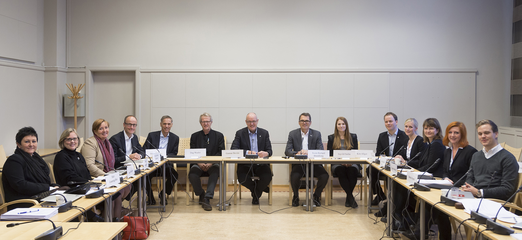 NTNUs styre pr. 24.11.2015. Dette styret skal sitte til 31. juli 2017. Fra venstre: Marit Grønning-Moe (repr. tekn.adm.), Sarah Paulson (vara, vit.skap), Kristin Melum Eide (repr. vit.skap), Nils Kristian Nakstad (ekstern repr.), Helge Holden (repr. vit.skap), Dag Waaler (repr. vit.skap), rektor Gunnar Bovim (styrets sekretær), Svein R. Brandtzæg (styreleder), Ingvild Sørlie (stud.repr.), Kim Allgot (stud.repr.), Guro Busterud (repr. midl. vit.skap), Nina Refseth (ekstern repr.), Kjersti Møller (stud.repr.), Dennis Bogen (stud.repr.) Bjarne Foss (repr. vit.skap) og Espen Remme (ekstern repr.) var ikke til stede